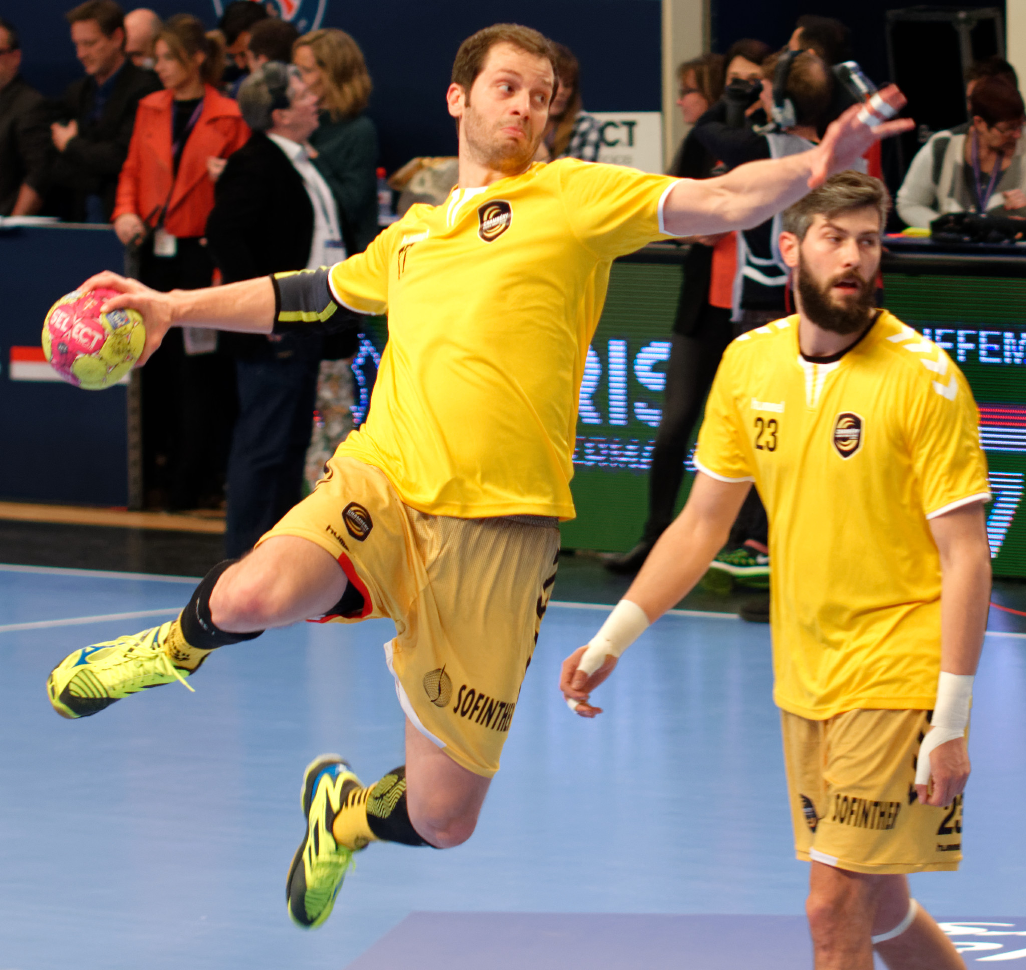 Rencontre de championnat de LidlStarLigue entre le PSG et chambéry. A coubertin, le 15 mars 2017.